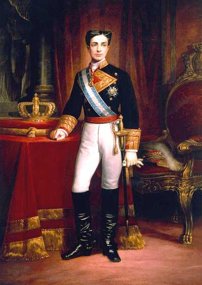 Retrato del rey Alfonso XII de España (1857-1885). El rey aparece representado de cuerpo entero y con el uniforme de capitán general, acompañado por pantalón blanco y botas altas negras. Y luce además el Toisón de Oro y la banda y la placa de la Orden de Carlos III. Esta obra sigue el tipo de retrato oficial en que el pintor atiende no sólo a plasmar el aspecto físico del personaje, sino sobre todo a rodearle de aquellos elementos que simbolizan su rango. El monarca tenía veinte años de edad cuando se hizo esta obra, a pesar de que con el peinado que lleva aparenta aún más juventud. Eduardo Balaca presentó este retrato en la Exposición Nacional de Bellas Artes de 1878, aunque sin obtener recompensa alguna.